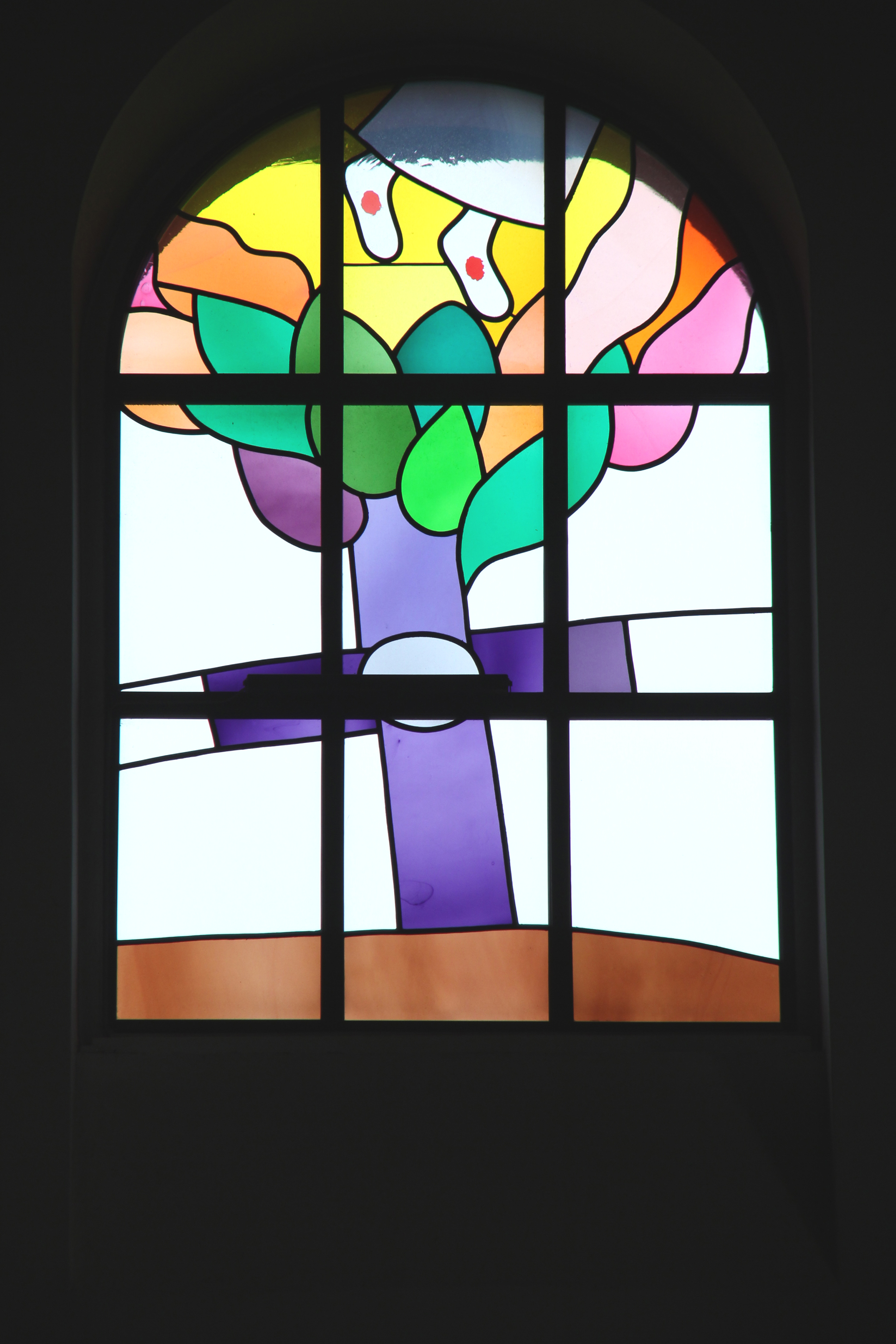 Römisch-katholische Pfarrkirche St. Franziskus Wollishofen, Glasfenster von Max Rüedi